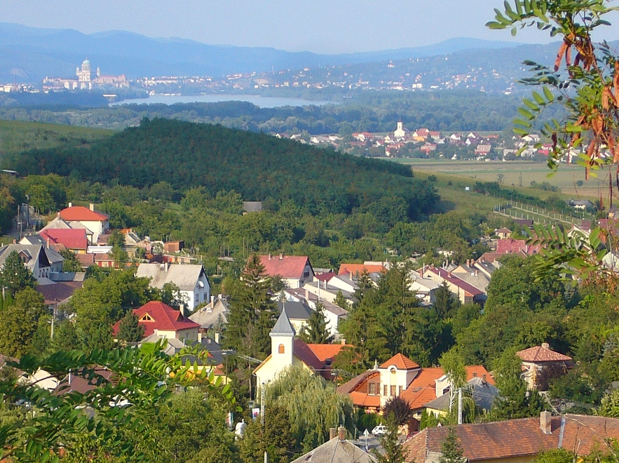 Mogyorósbánya látképe, háttérben az esztergomi bazilikával